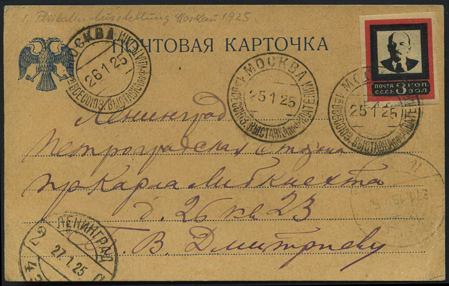 Почтовая карточка, отправленная из Москвы в Ленинград в январе 1925 года, франкированная маркой СССР из траурного ленинского выпуска. Погашена специальным почтовым штемпелем Всесоюзной выставки по филателии и бонам